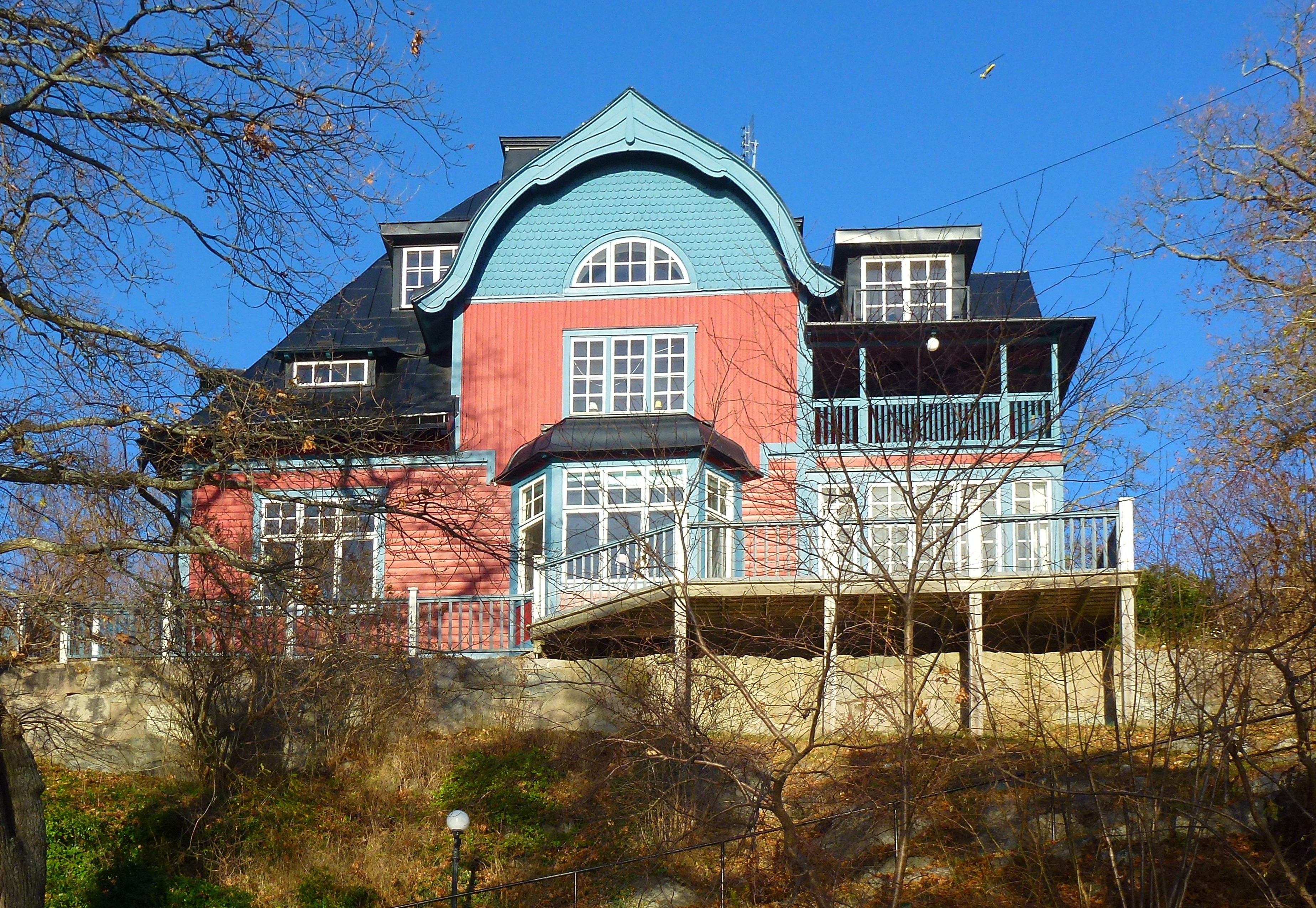 "Villa Solbacken" på Pålnäsvägen 17 i området Baggensudden, ritad 1903 av Carl Albert Collett.